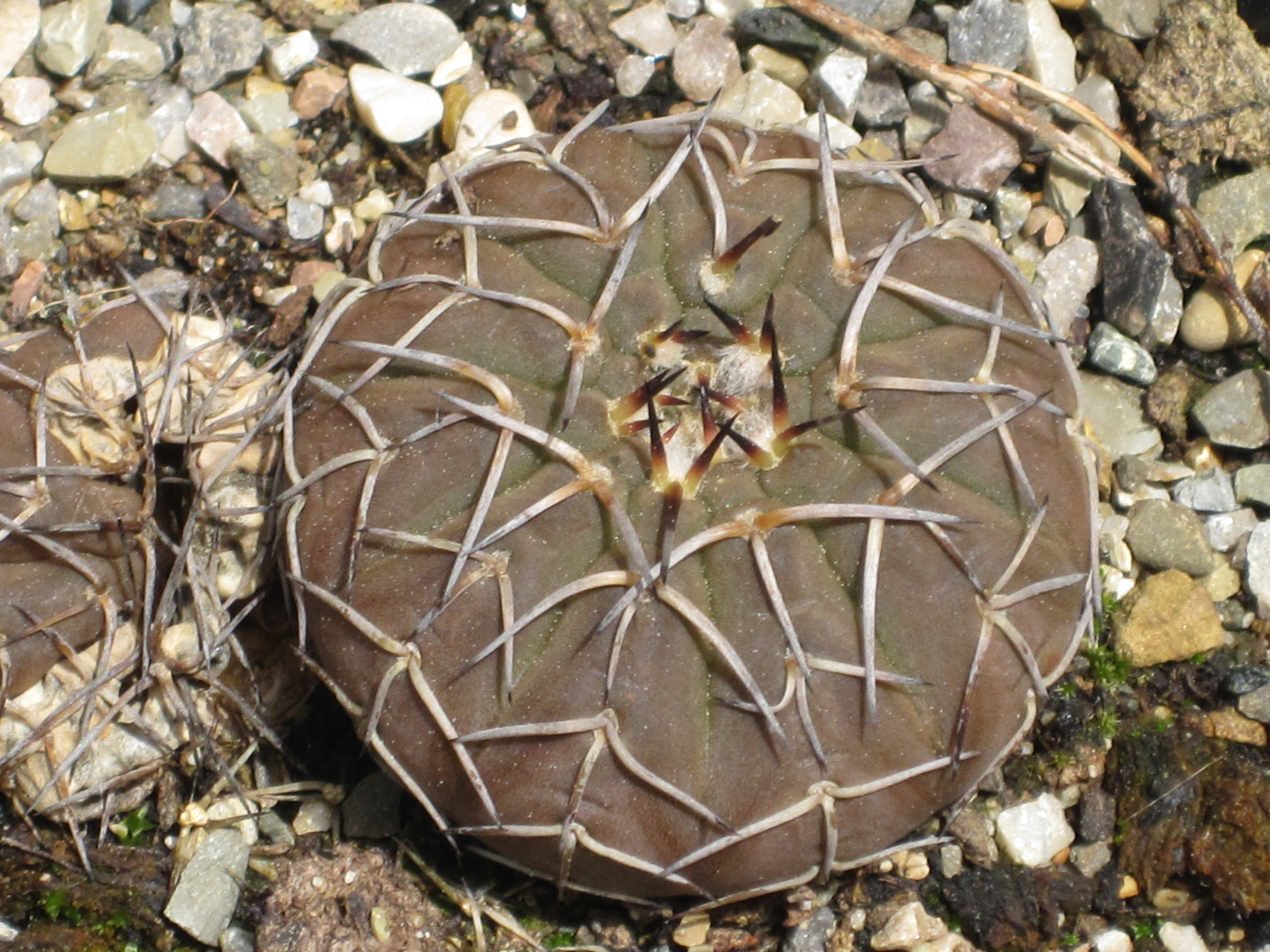 Pianta di gymnocalycium stellatum